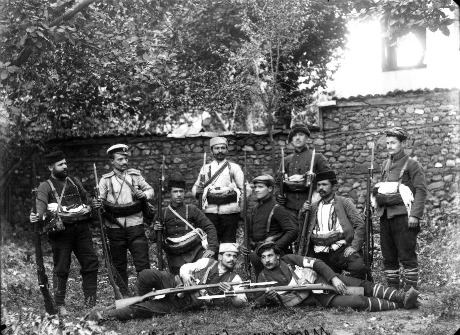 IMARO voevoda Metodi Stoychev and his cheta